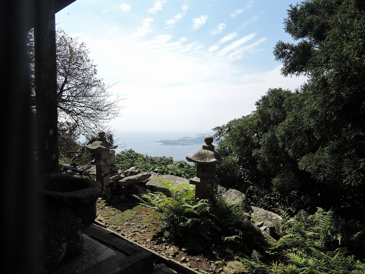 沖ノ神島神社から望む小値賀島